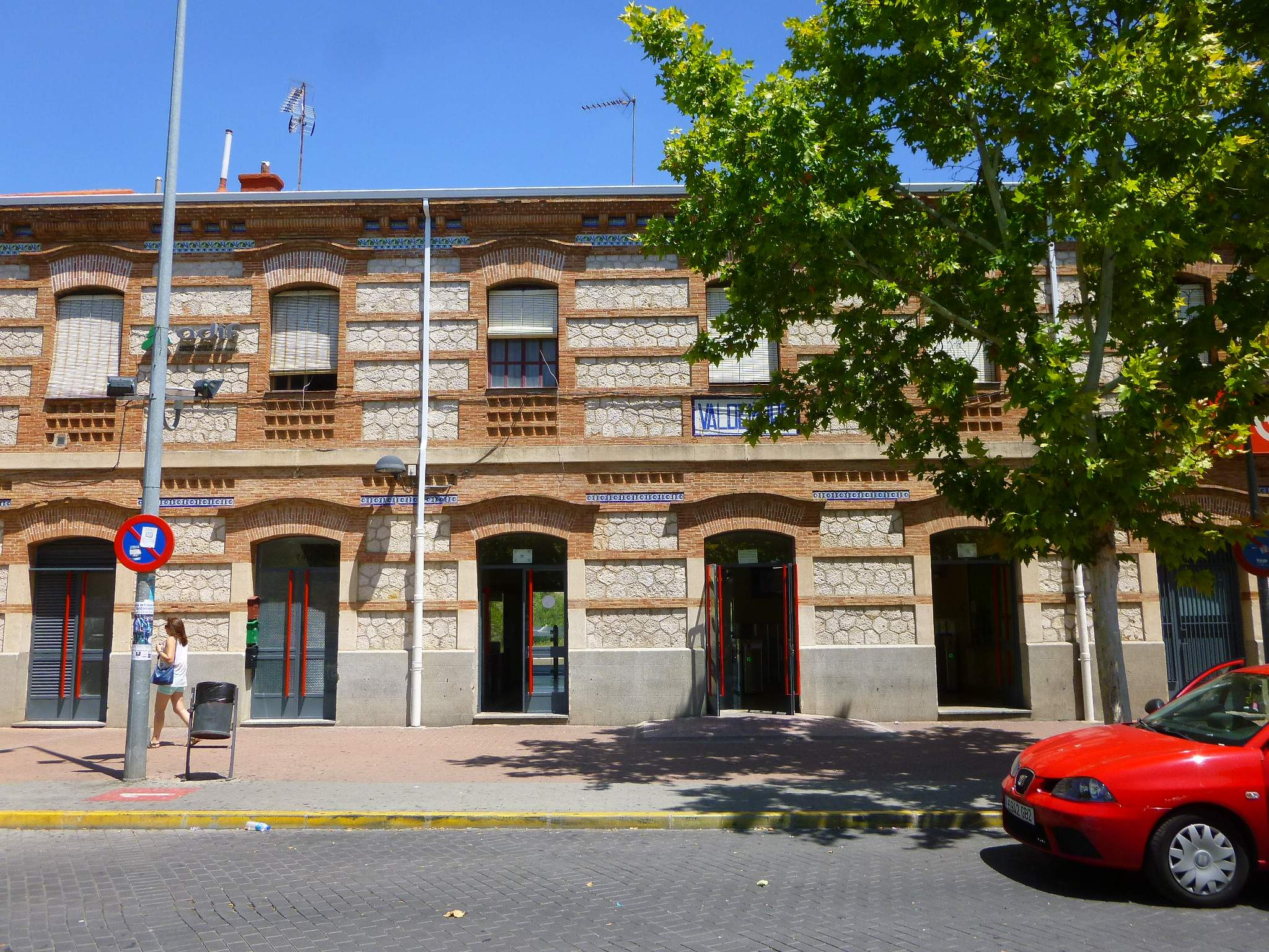 Estacion de tren de Valdemoro (Madrid)